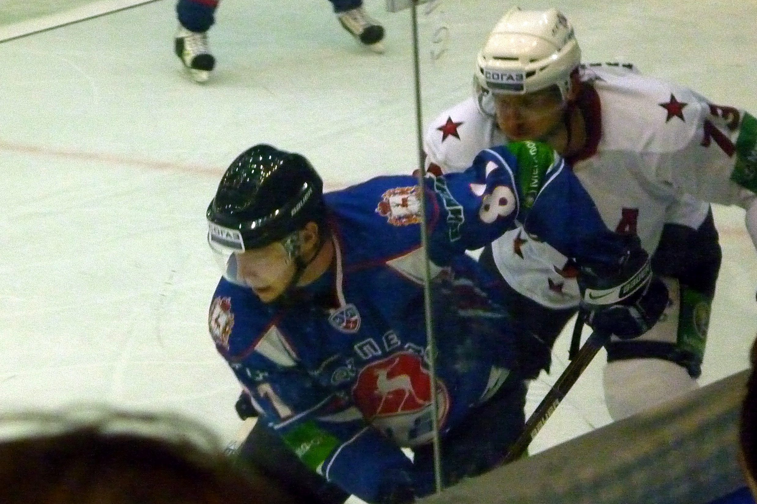 Нападающий нижегородского «Торпедо» Андрей Поснов во время матча с питерским СКА 12 декабря 2010